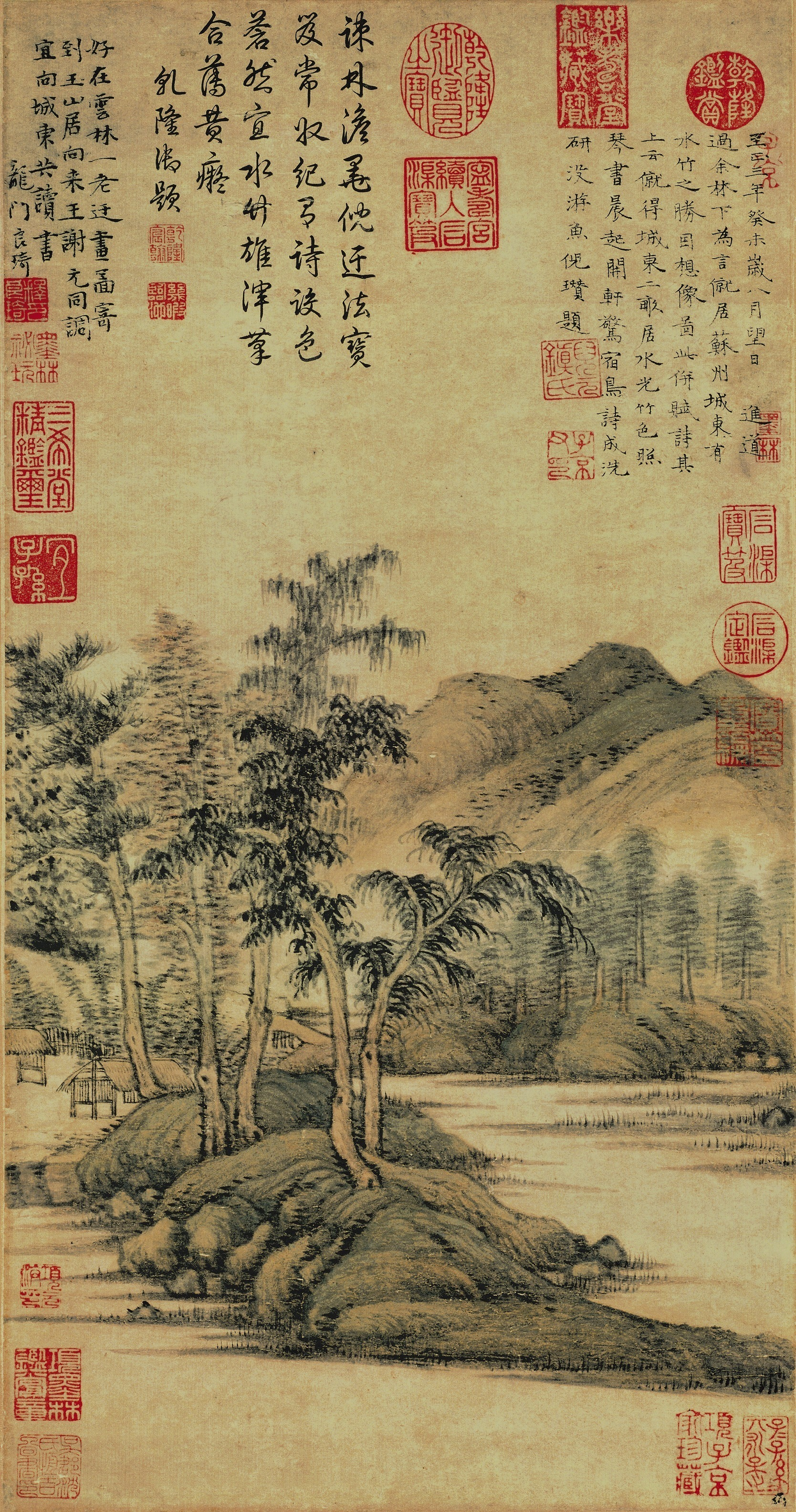 Ни Цзань. Воды и бамбуковый домик. 1343 Музей кит. истории